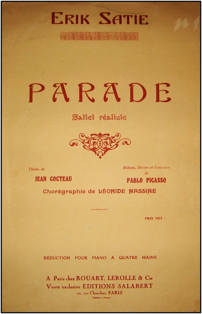 Paris: Rouart, Lerolle & Cie., 1917. First edition, first issue. Théme de Jean Cocteau. Rideau, Decors et Costumes de Pablo Picasso. Chorégraphie de Leonide Massine. Réduction pour piano a quatre mains.